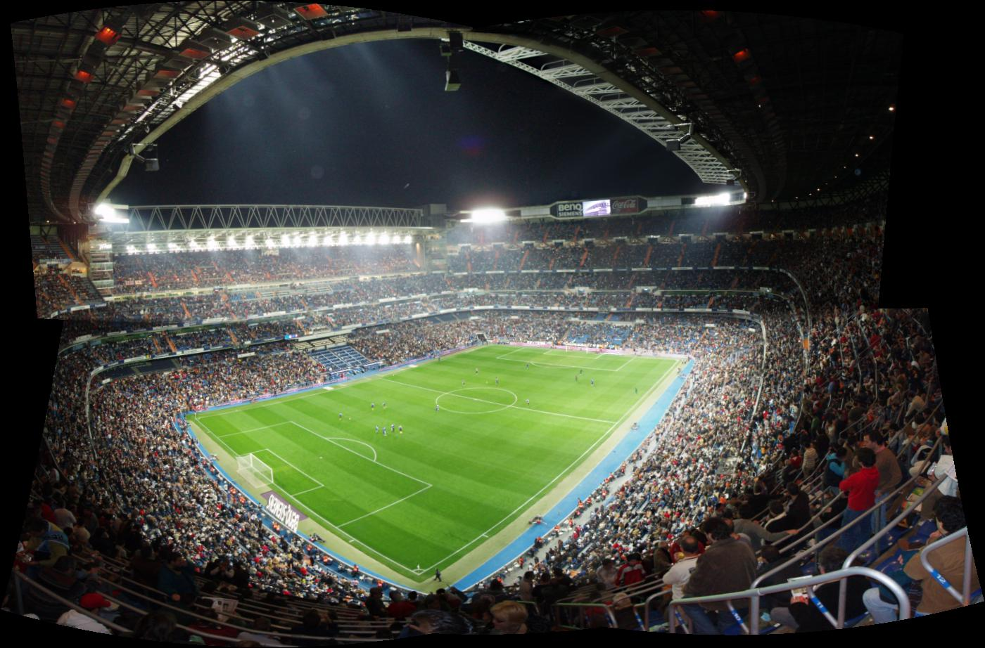 Composición de seis fotos de el estadio santiago bernabeu del real madrid, tomadas desde el vomitadero de la torre 3 entre el tercer y el cuarto anfiteatro. Me encanta el resultado.